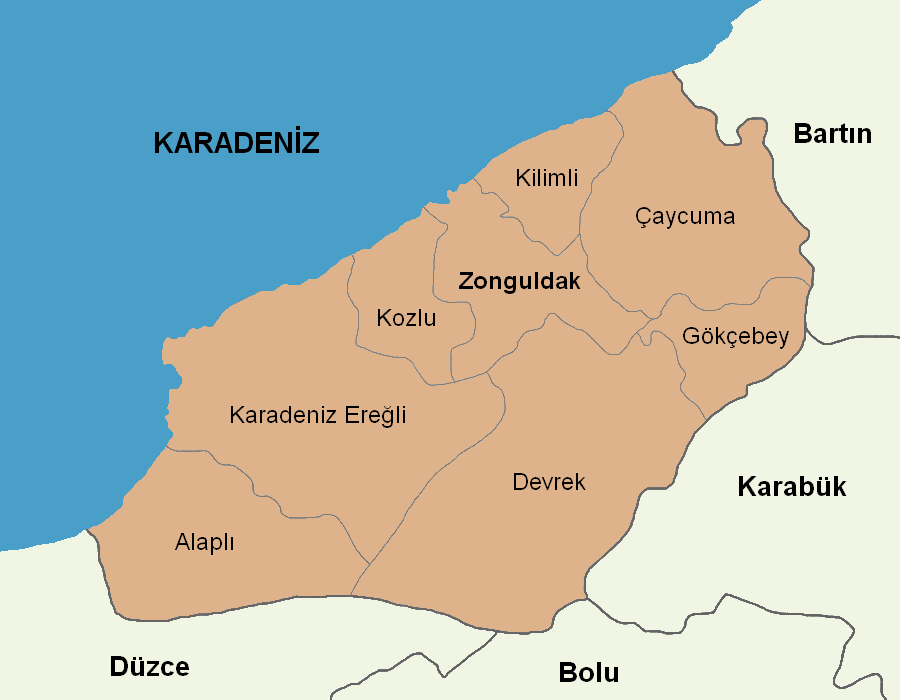 Zonguldak'ın ilçelerini gösteren harita